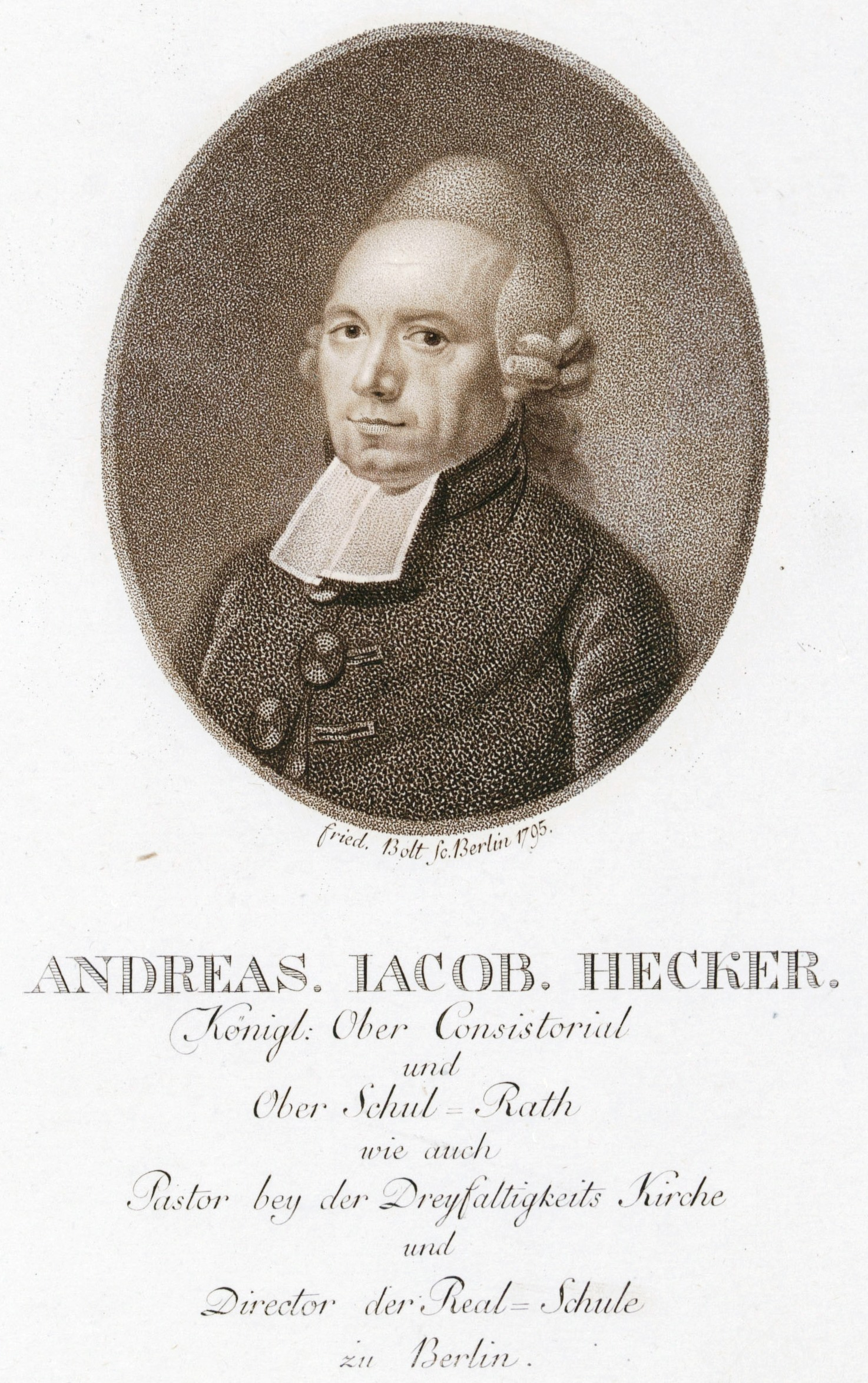 Andreas Iacob Hecker, Königl. Ober Consistorial und Ober Schul-Rath wie auch Pastor bey der Dreyfaltigkeits Kirche und Director der Real-Schule zu Berlin